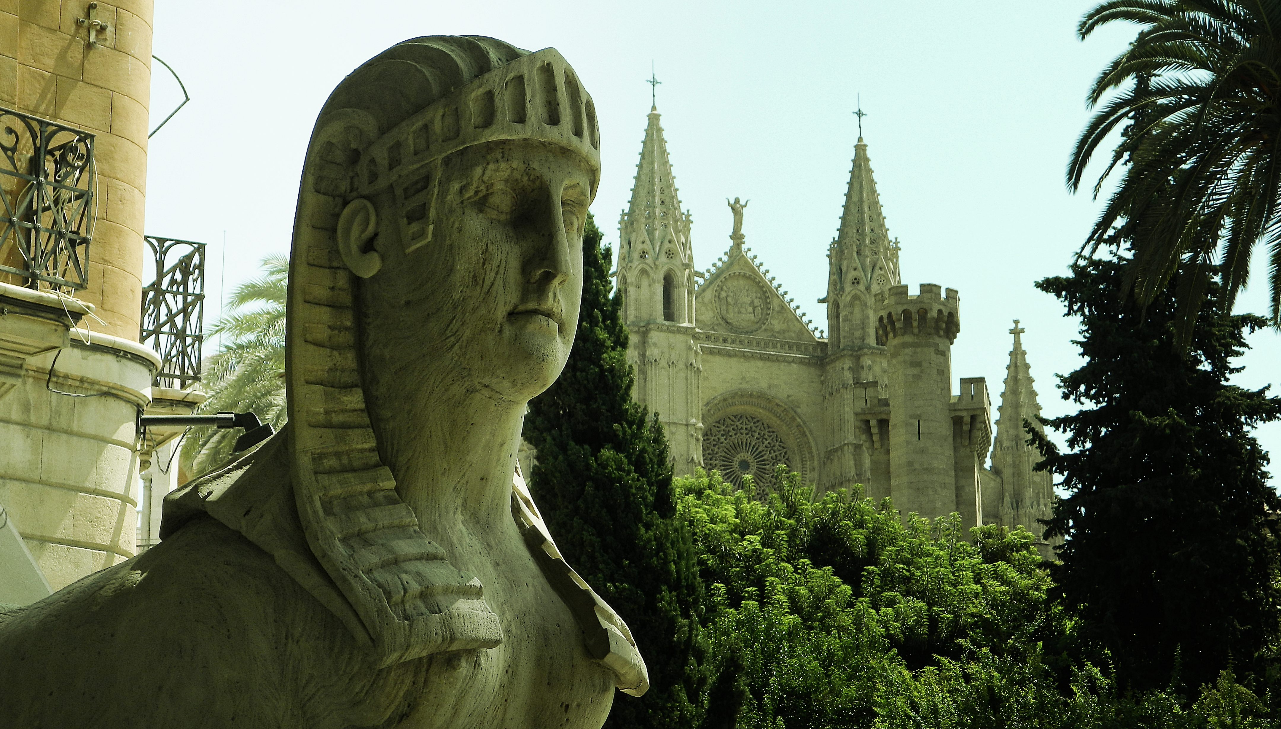 Catedral de Palma vista desde Plaza de la Reina / esquina Borne.